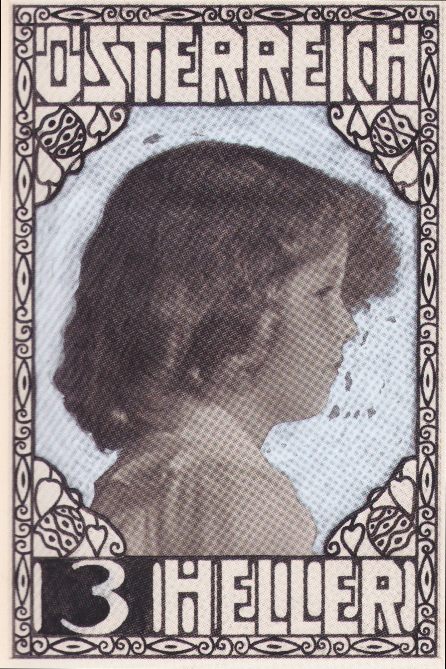 (nicht angenommen)